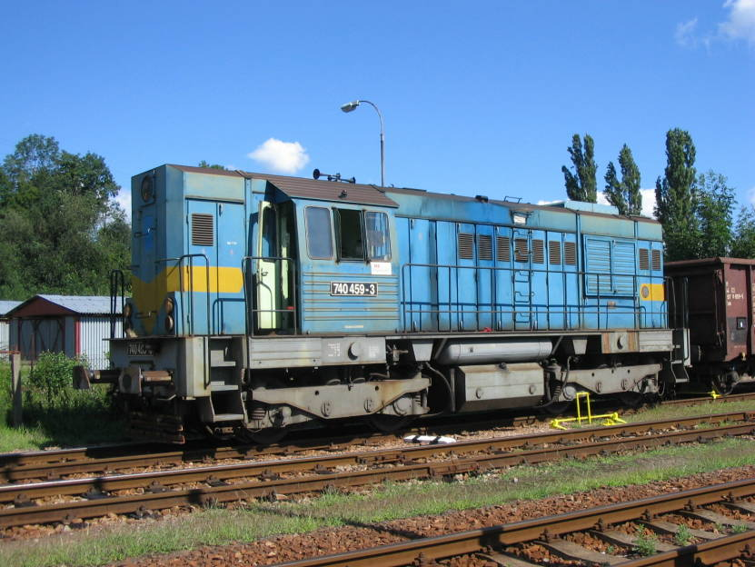 Lokomotiva řady 740, stanice Vamberk